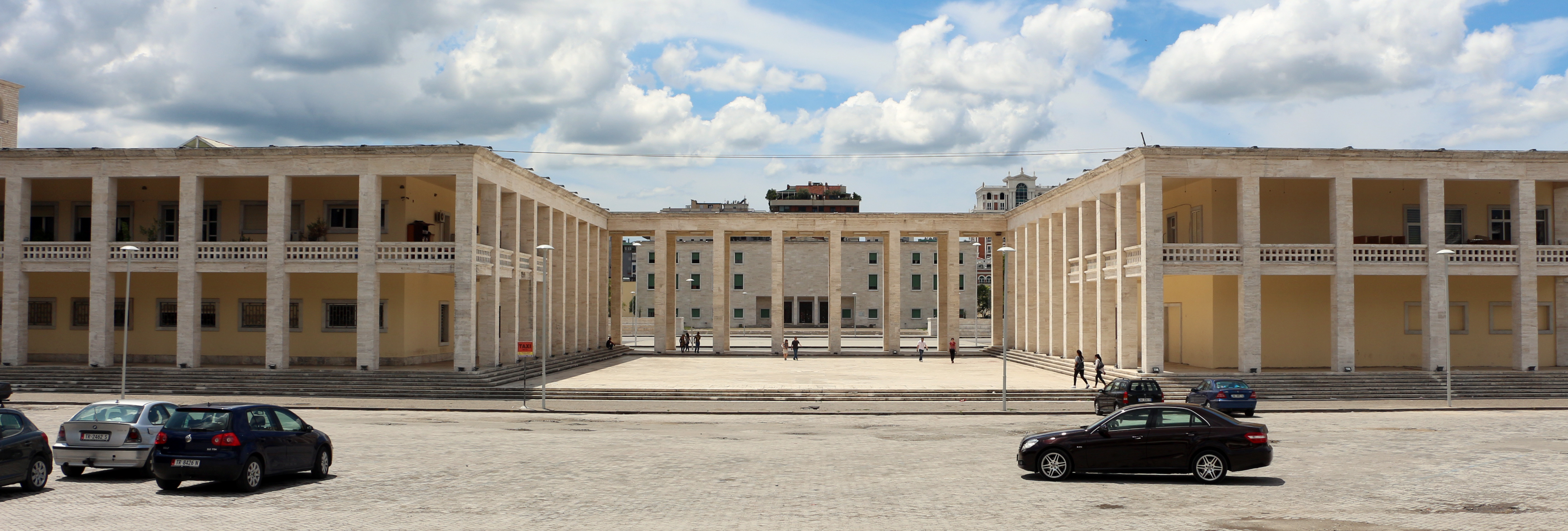 Muzeu Arkeologjik